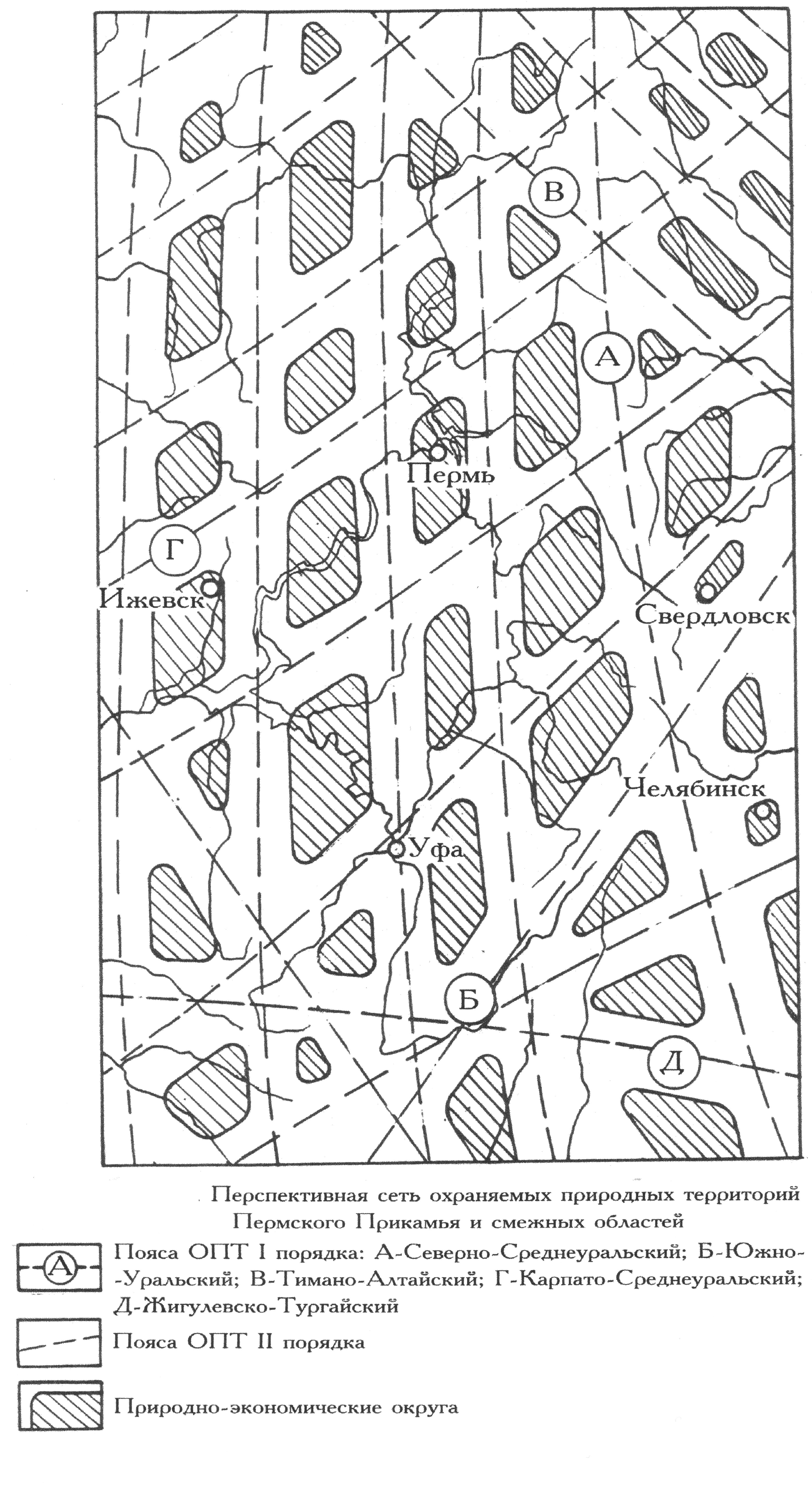 Перспективная сеть охраняемых природных территорий. Источник: Памятники природы Пермской области / Сост. Л. Баньковский. – Пермь: Кн. изд-во, 1983. – 164 с. (для статьи Баньковский Лев Владимирович)